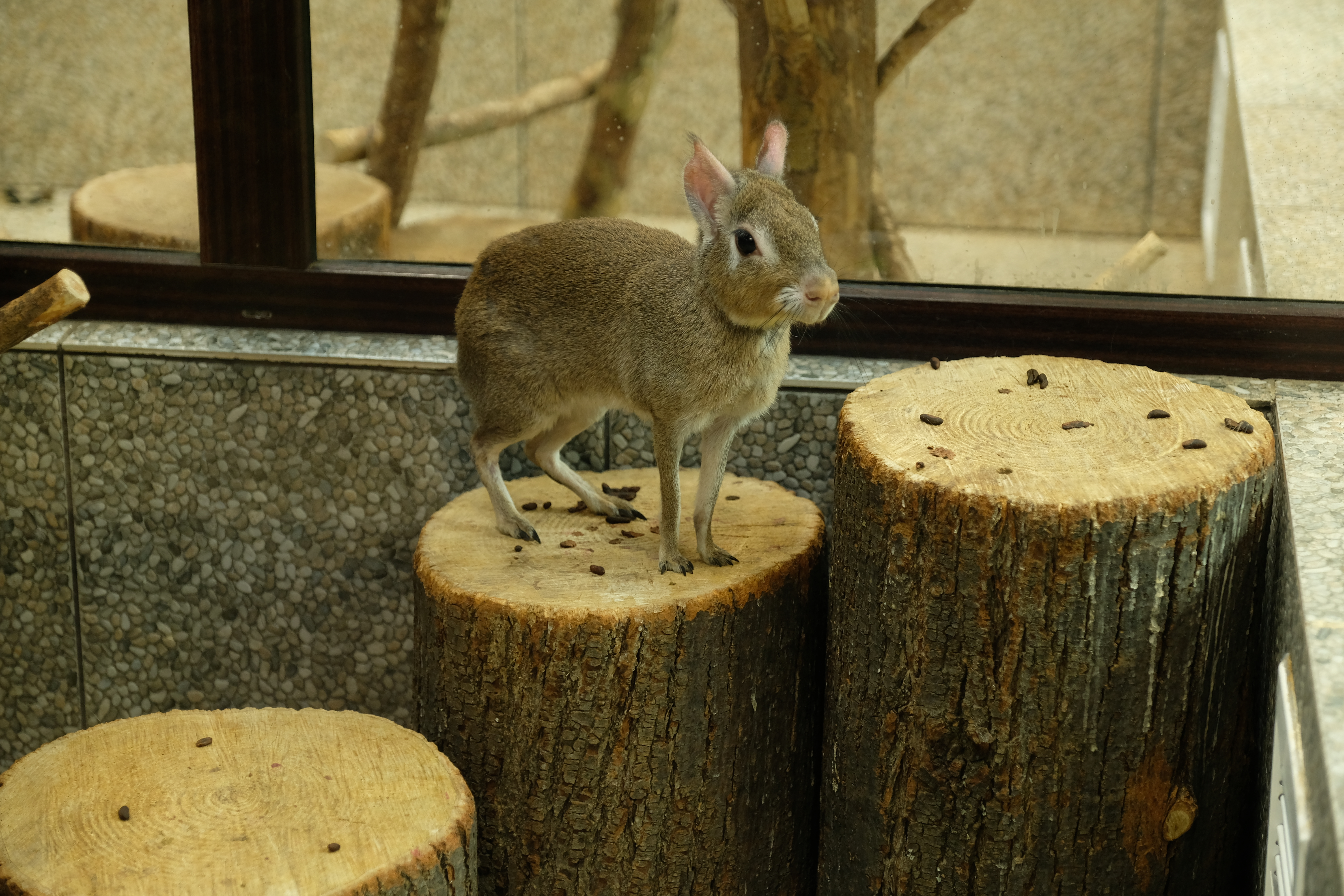 Мара (патагонский заяц) в Ижевском зоопарке